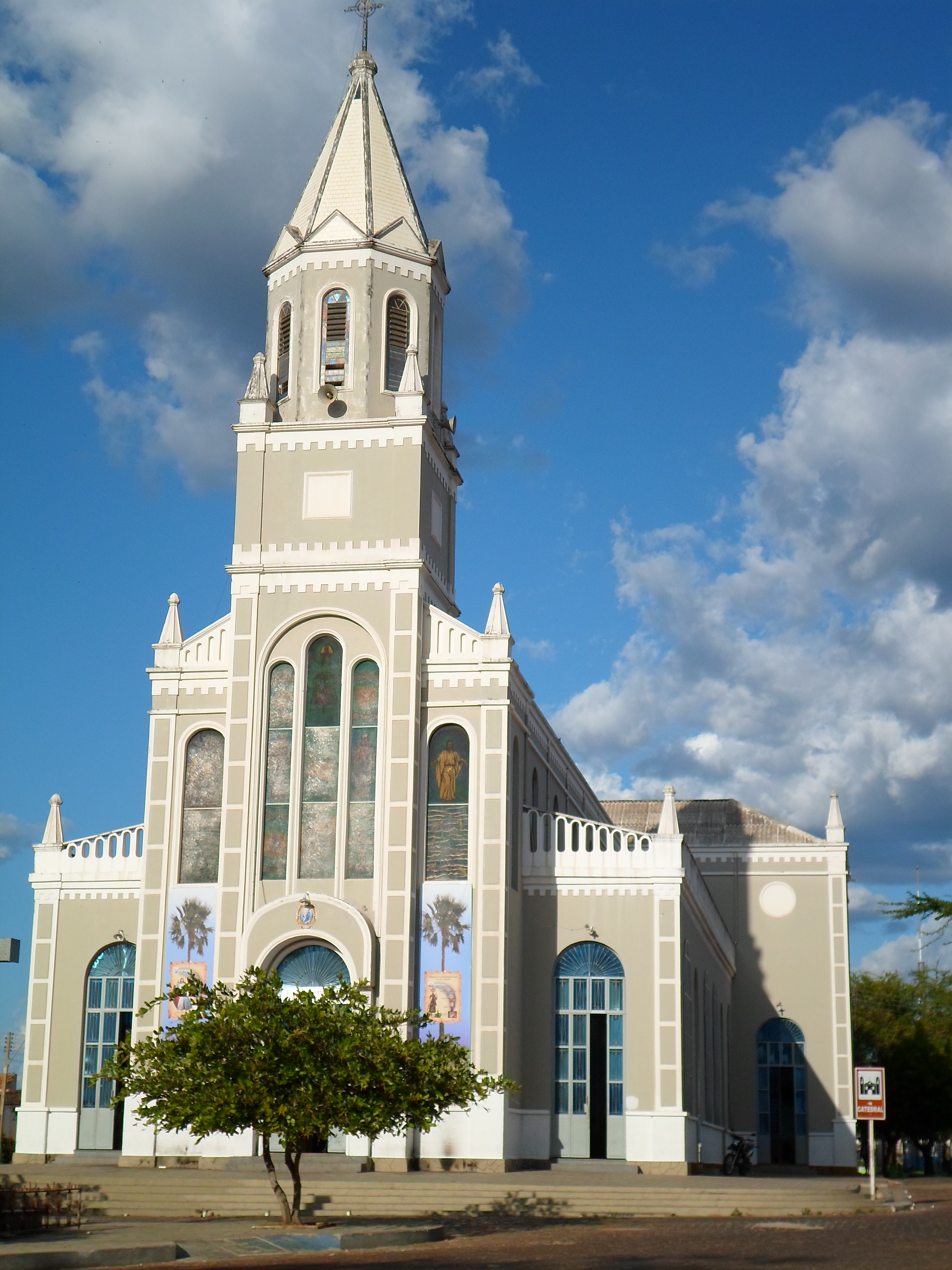 Catedral de Santo Antonio Campo Maior-Piauí-Brasil.